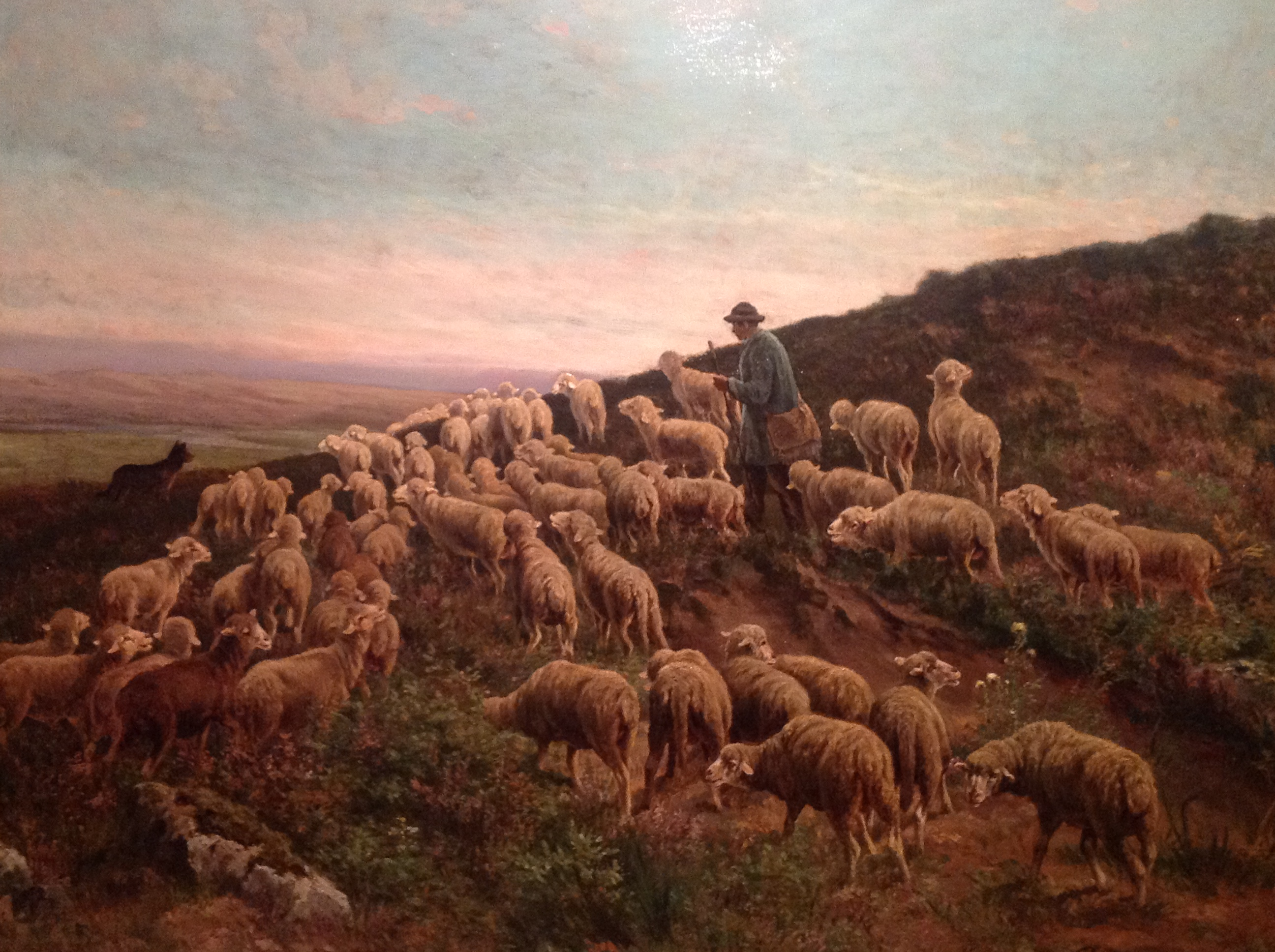 Huile sur toile; signée en bas à droite, 120 x 163cm